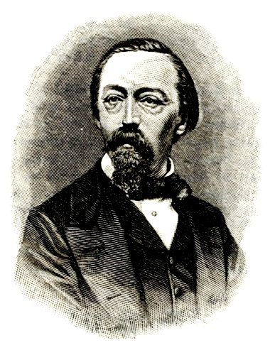 Ludwig Nicolai Graf von Rehbinder (1823–1876)